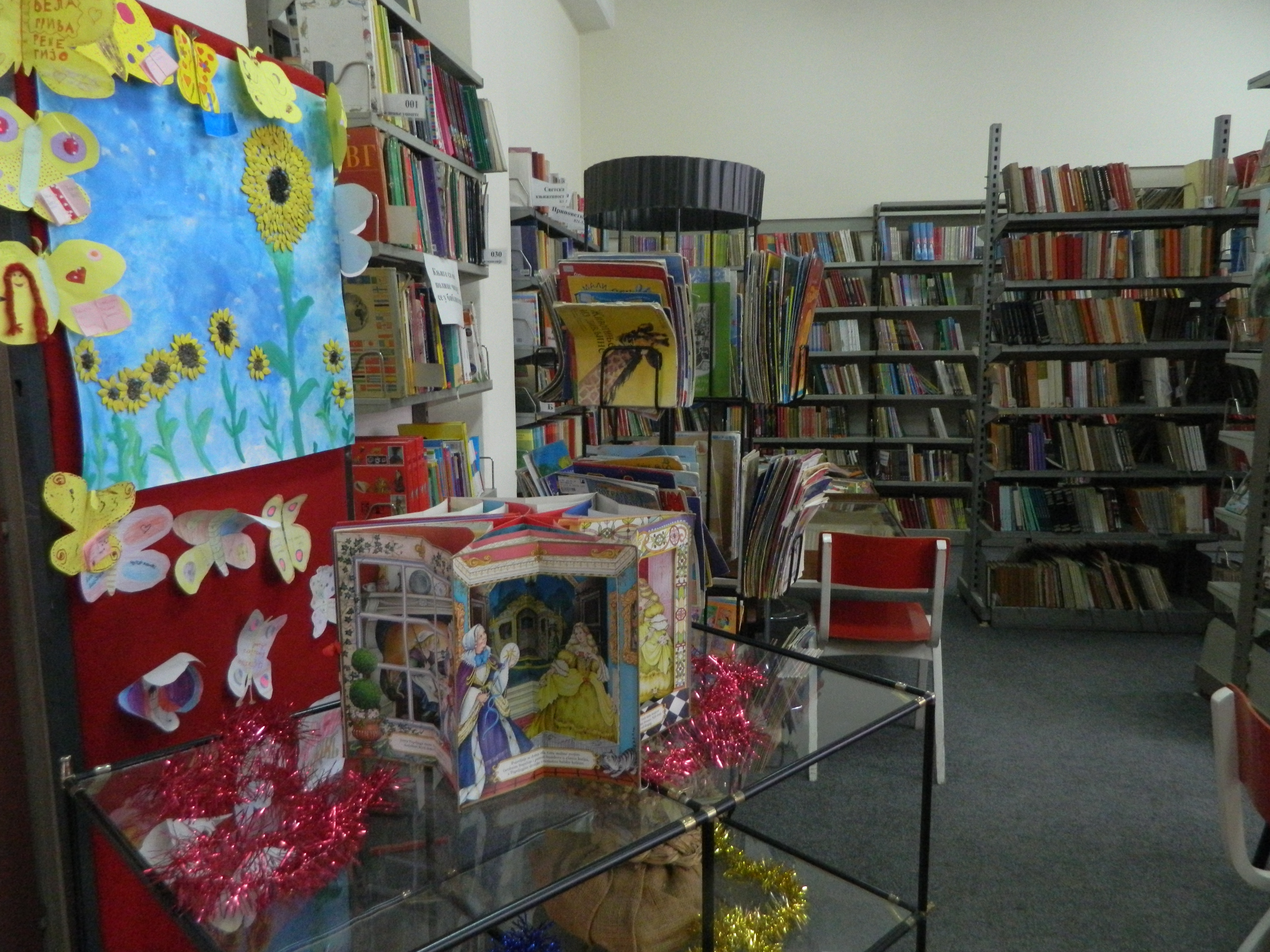 Јавна библиотека “Бора Станковић” Врање